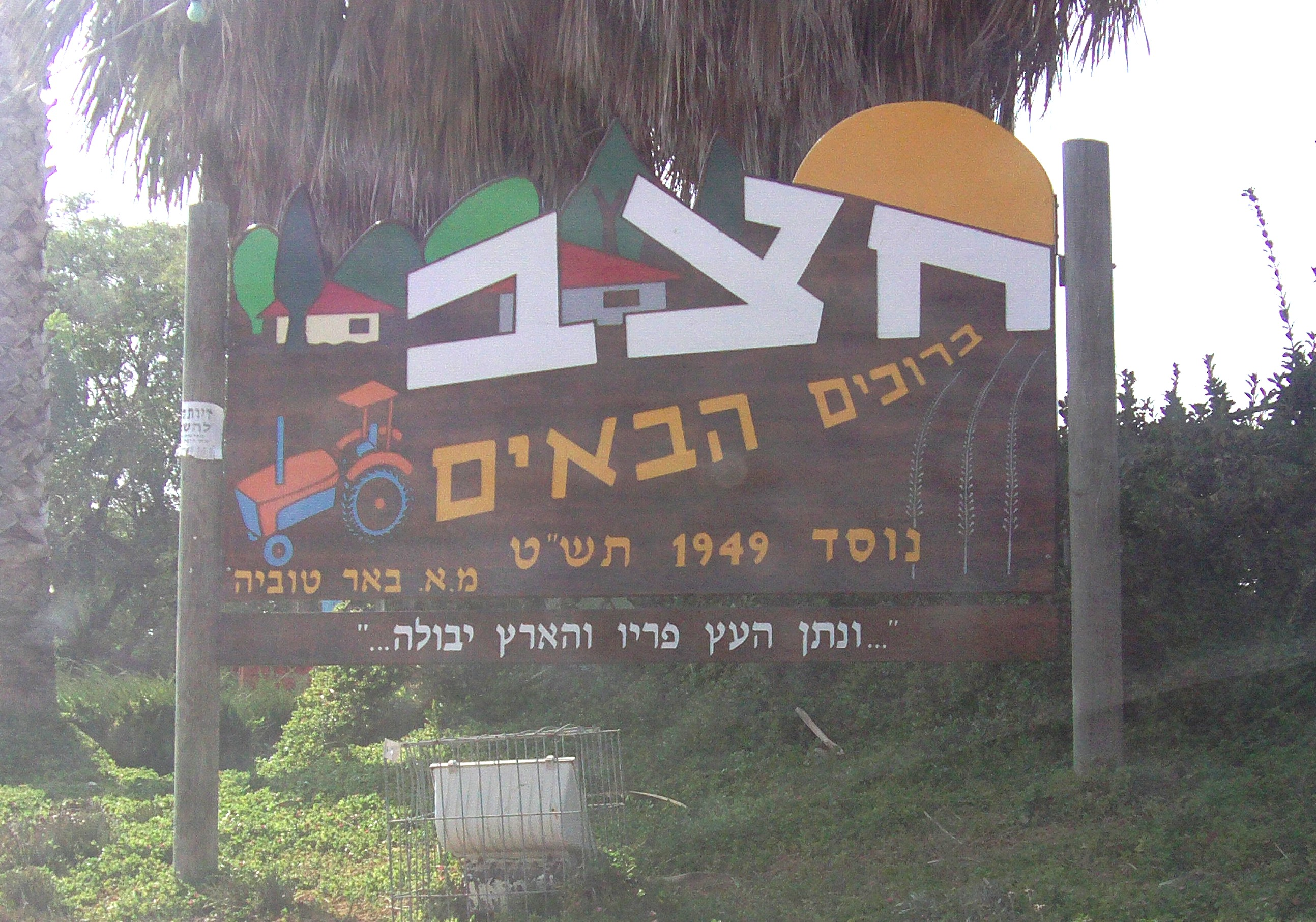 מושב חצב שלט הכניסה לחצב